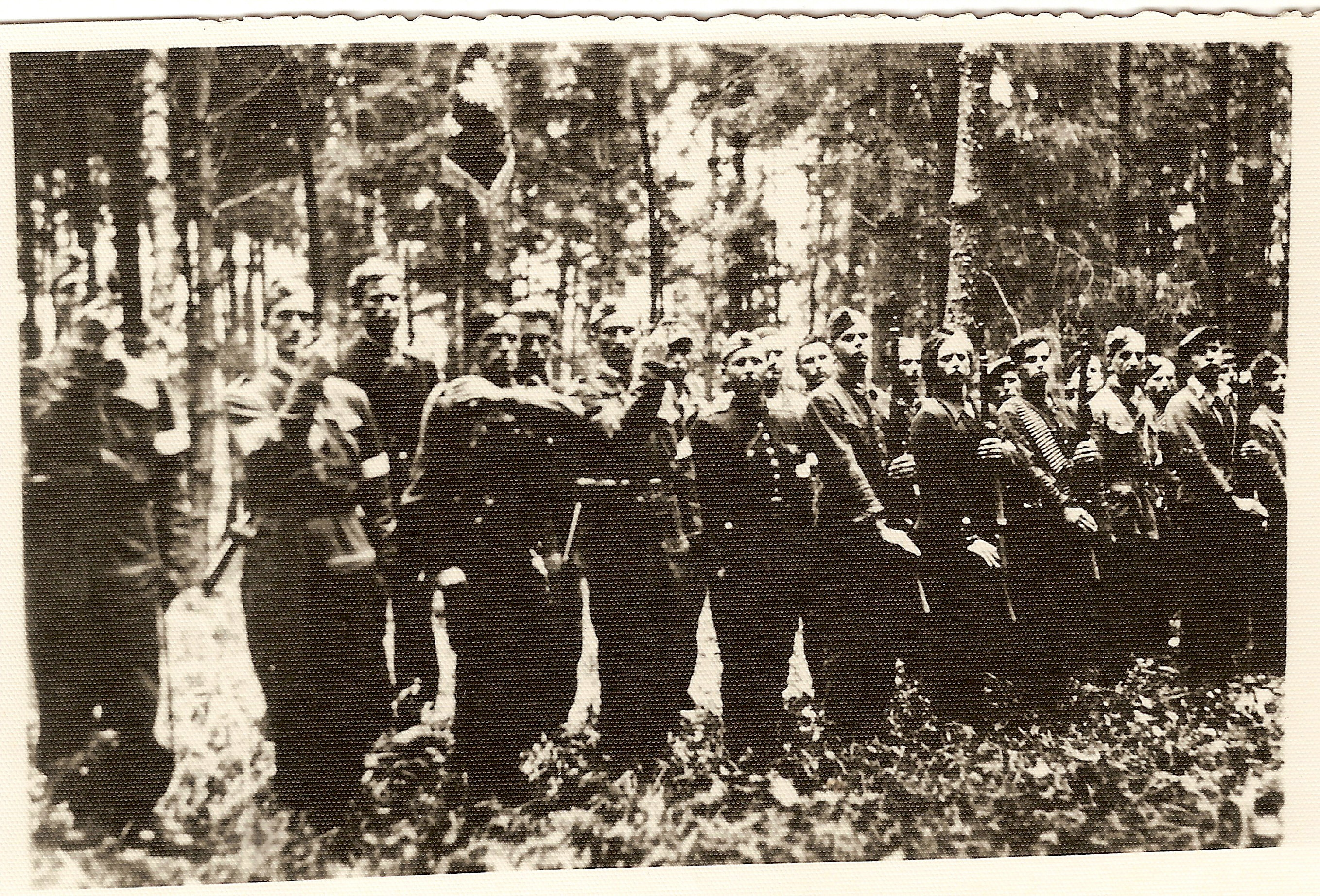 Żołnierze Oddziału Leśnego "Lech"